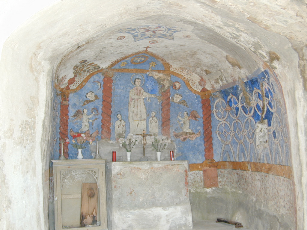 Interior de la ermita de San Visorio (San Vicente de Labuerda, Huesca).